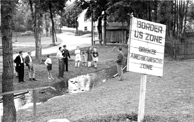 ADN-ZB- Donath Deutschland, Juli 1949 (amerikanische Besatzungszone), Grenzort Mödlareuth. Der Bach bildet die Zonengrenze zwischen Thüringen und Bayern, die mitten durch das Dorf verläuft.